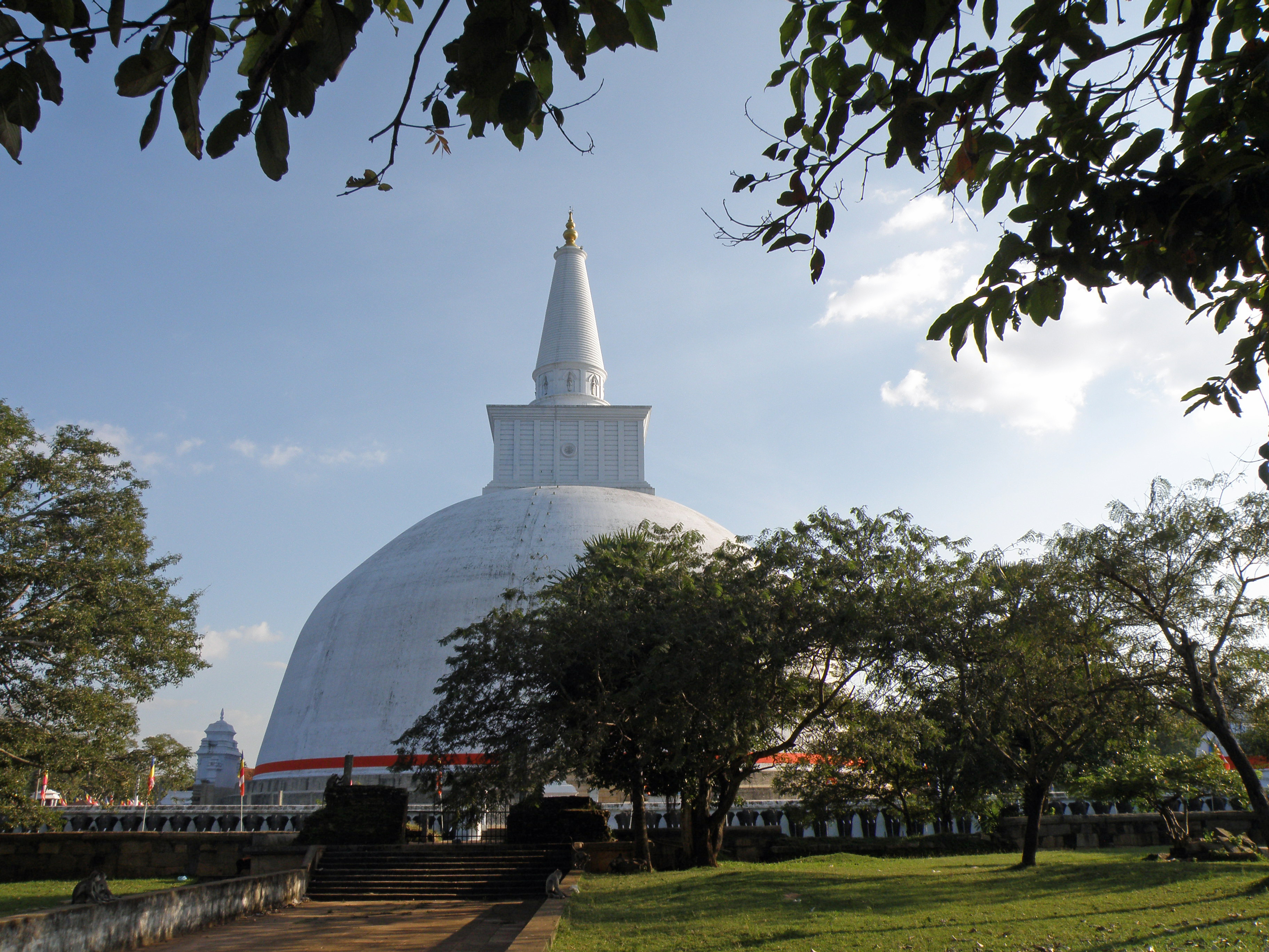 Sri Lanka - Site archéologique d'Anuradhapura - La grande stupa